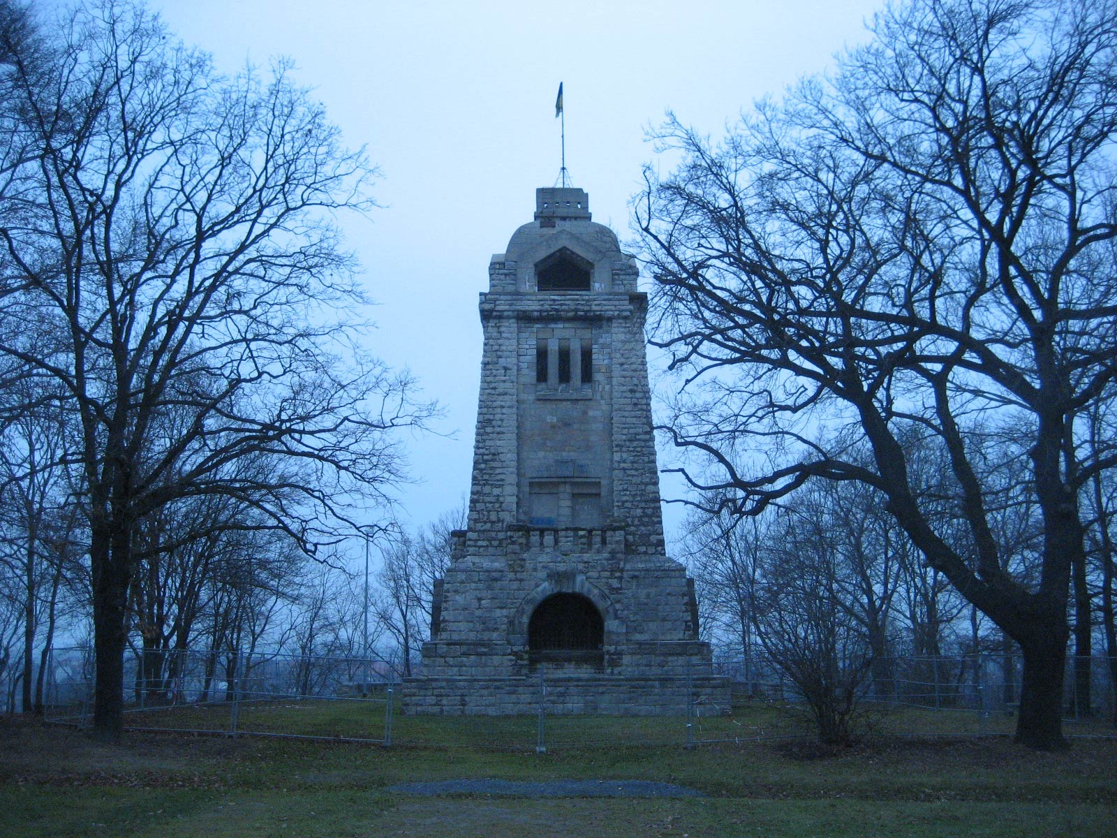 Der Bismarckturm in Weißenfels.